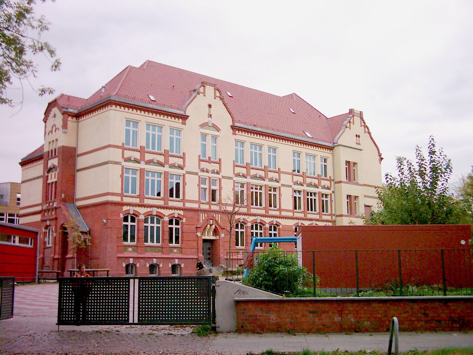 Die Theodor-Haubach-Schule in Hamburg-Altona-Nord. Siehe auch Image:Theodor-Haubach-Schule 01.jpg, Image:Theodor-Haubach-Schule 02.jpg.